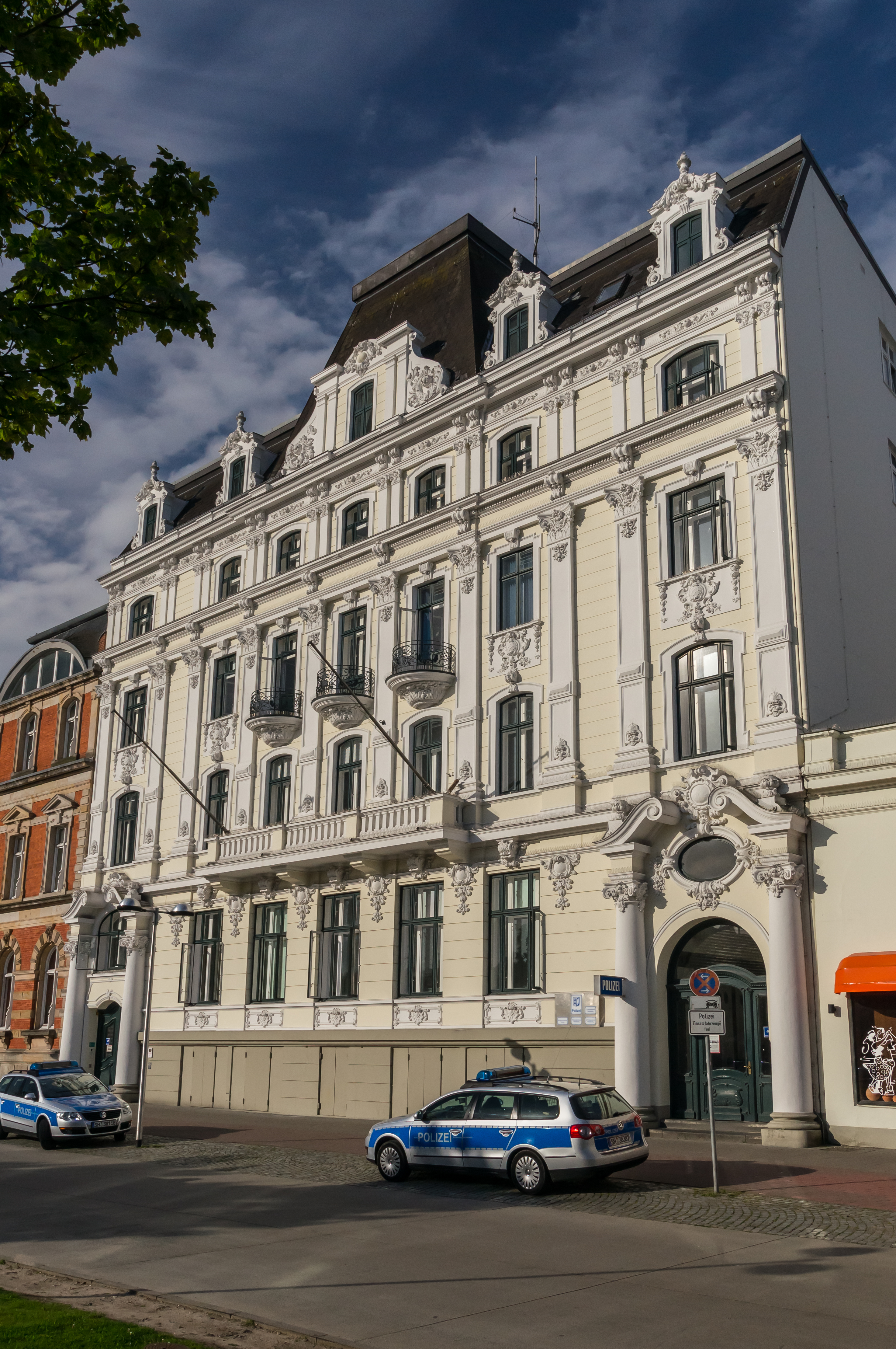 Flensburg-Altstadt; Norderhofenden 1; Ehemaliges Hotel „Flensburger Hof“ (Polizeiinspektion); Denkmal-Nr. 83